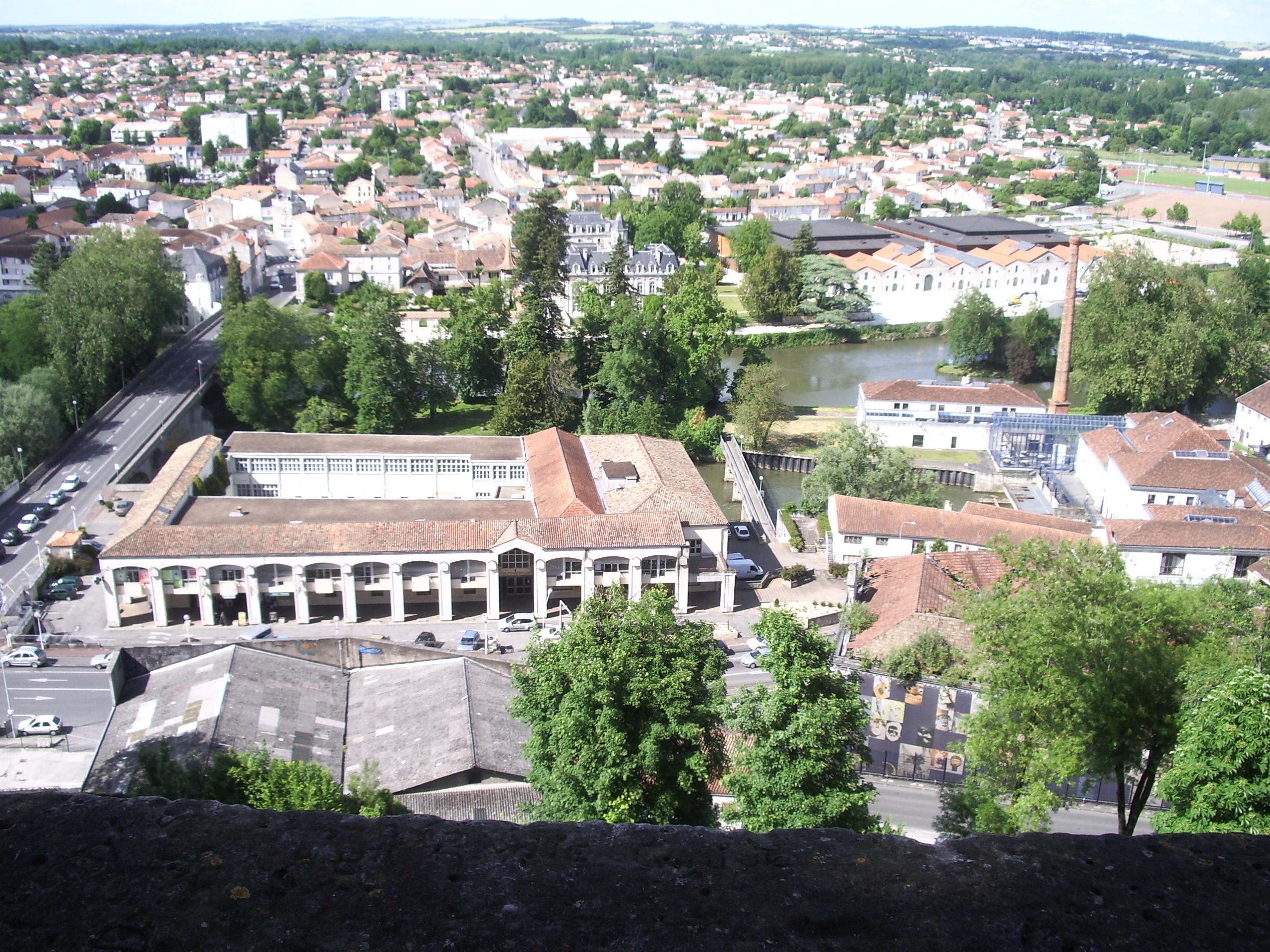 Vue du rempart de Beaulieu, Angoulême (Charente, France); Au 1er plan: ancienne papeterie du Nil, maintenant école des Beaux-Arts et musée du papier (à droite). De l'autre côté de la Charente, le quartier de Saint-Cybard.